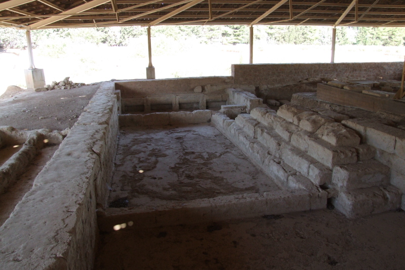 Das Badehaus im Heiligtum von Neme